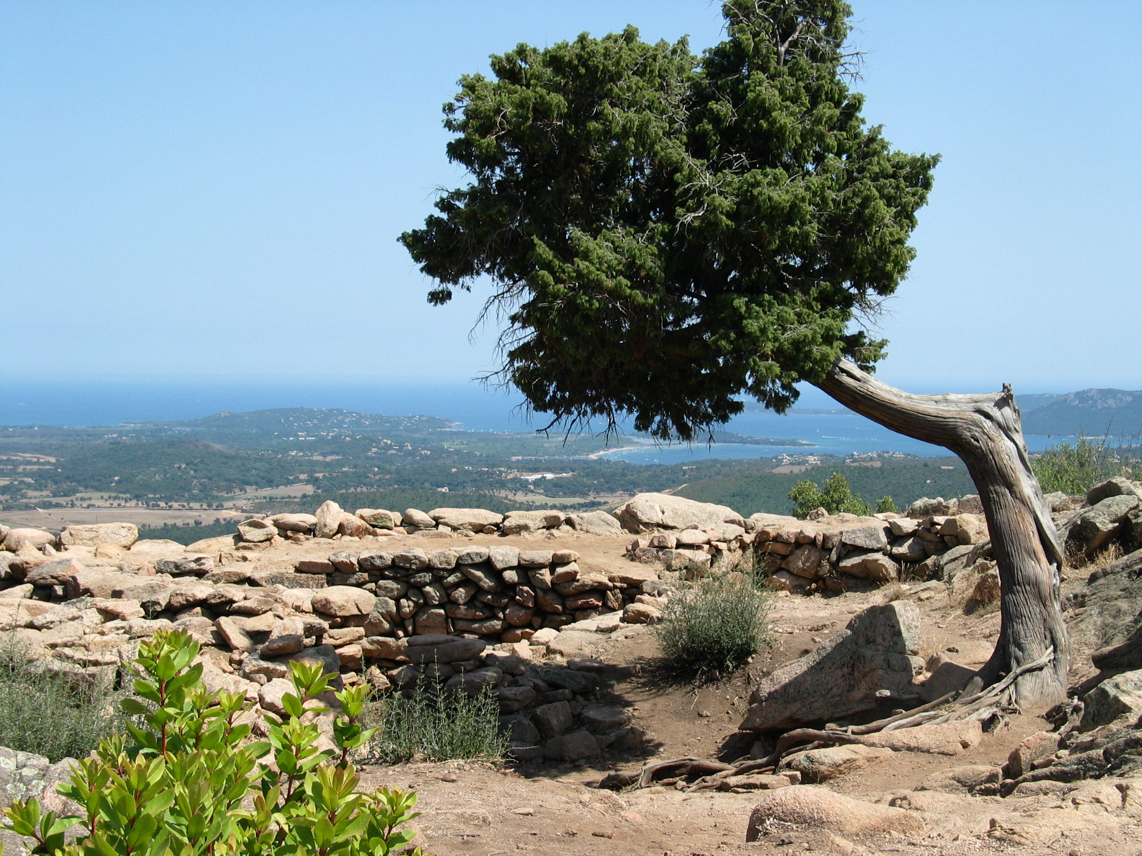 Castellu d' Araghju, un site préhistorique de Corse-du-Sud